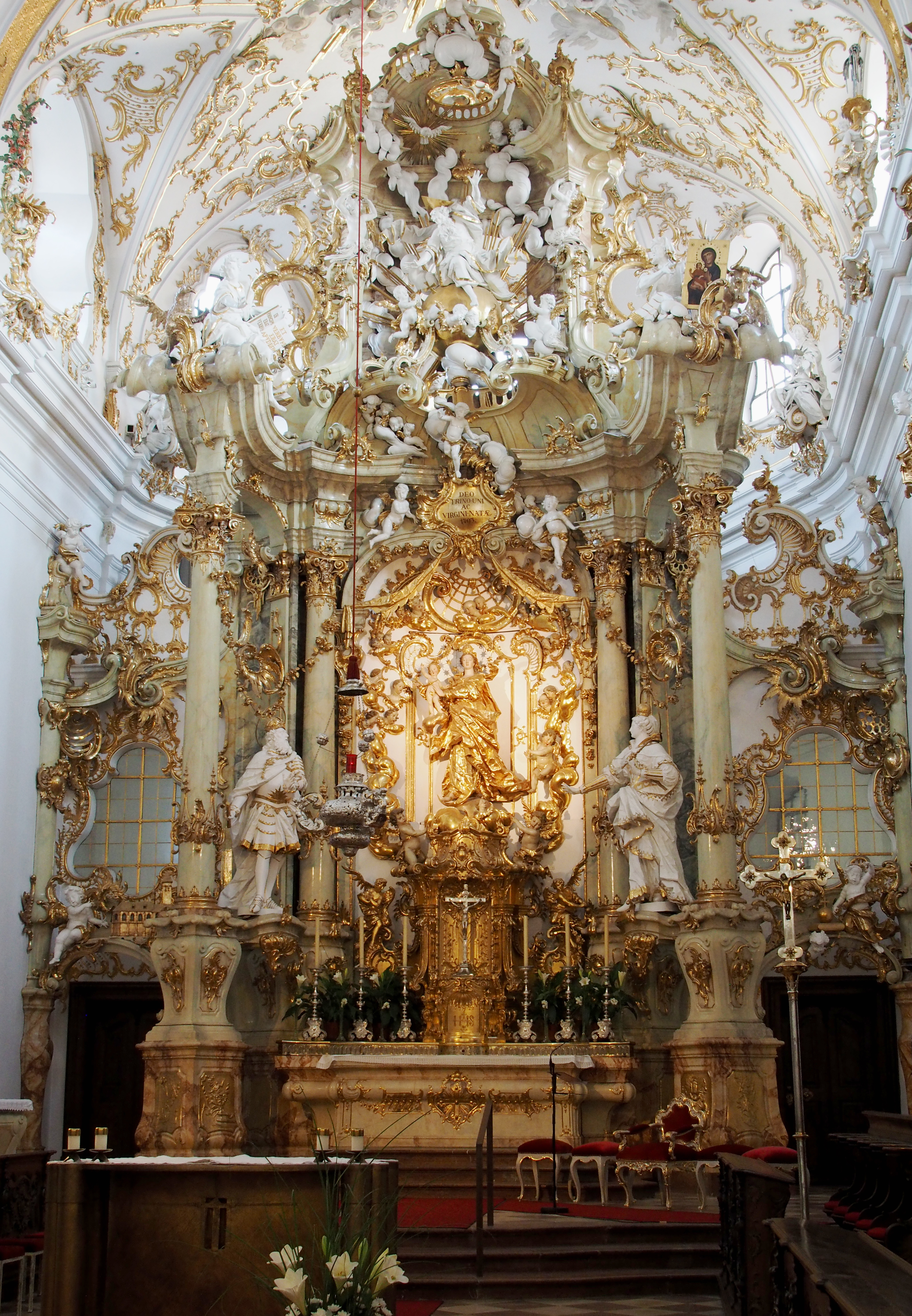 Altar in der „Alten Kapelle“ Regensburg